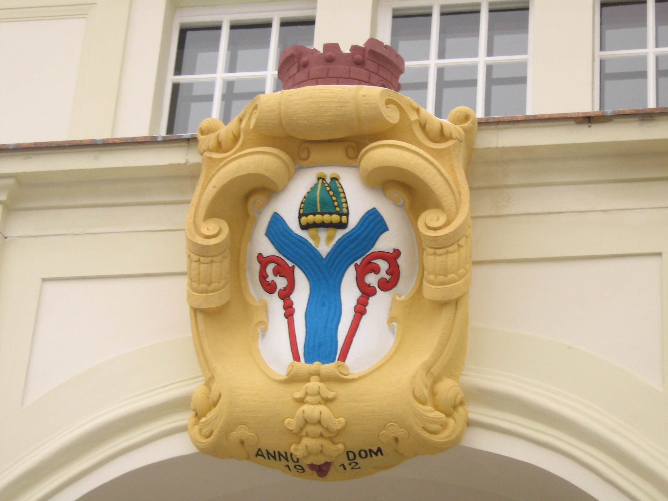 Herb Karlina na Ratuszu, autor zdjęcia Uczeń, 14.02.2007r.